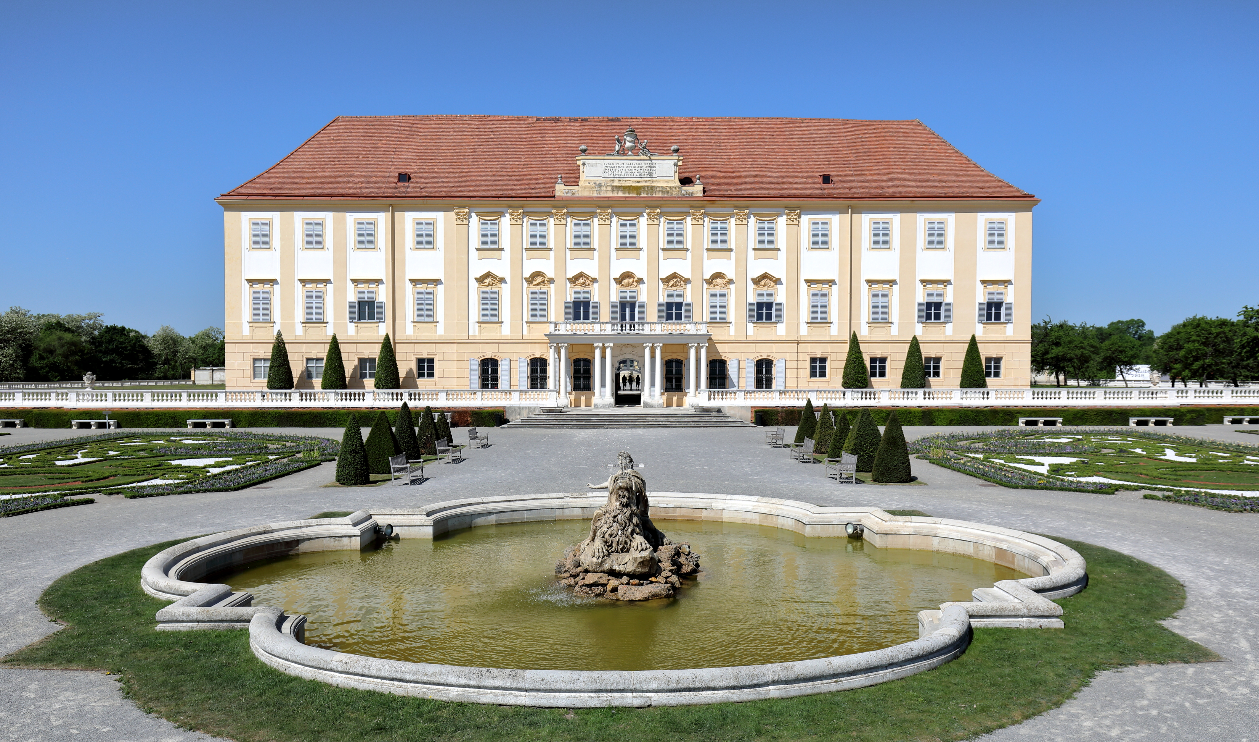 Die Hauptfassade bzw. der Osttrakt des Schlosses der Schlossanlage Schloss Hof in der niederösterreichischen Marktgemeinde Engelhartstetten.Die Schlossanlage wurde um 1627 auf einer Geländekante und östlich der mittelalterlichen Feste Hof errichtet. Nachdem 1725 Prinz Eugen die Anlage erworben hatte, baute er diese zu einem repräsentativen Landsitz aus. 1755 kam das Schloss in den Besitz von Maria Theresia. Von 1773 bis 1775 erfolgte dann ein Um- und Ausbau zum heutigen Erscheinungsbild durch Franz Anton Hillebrandt.